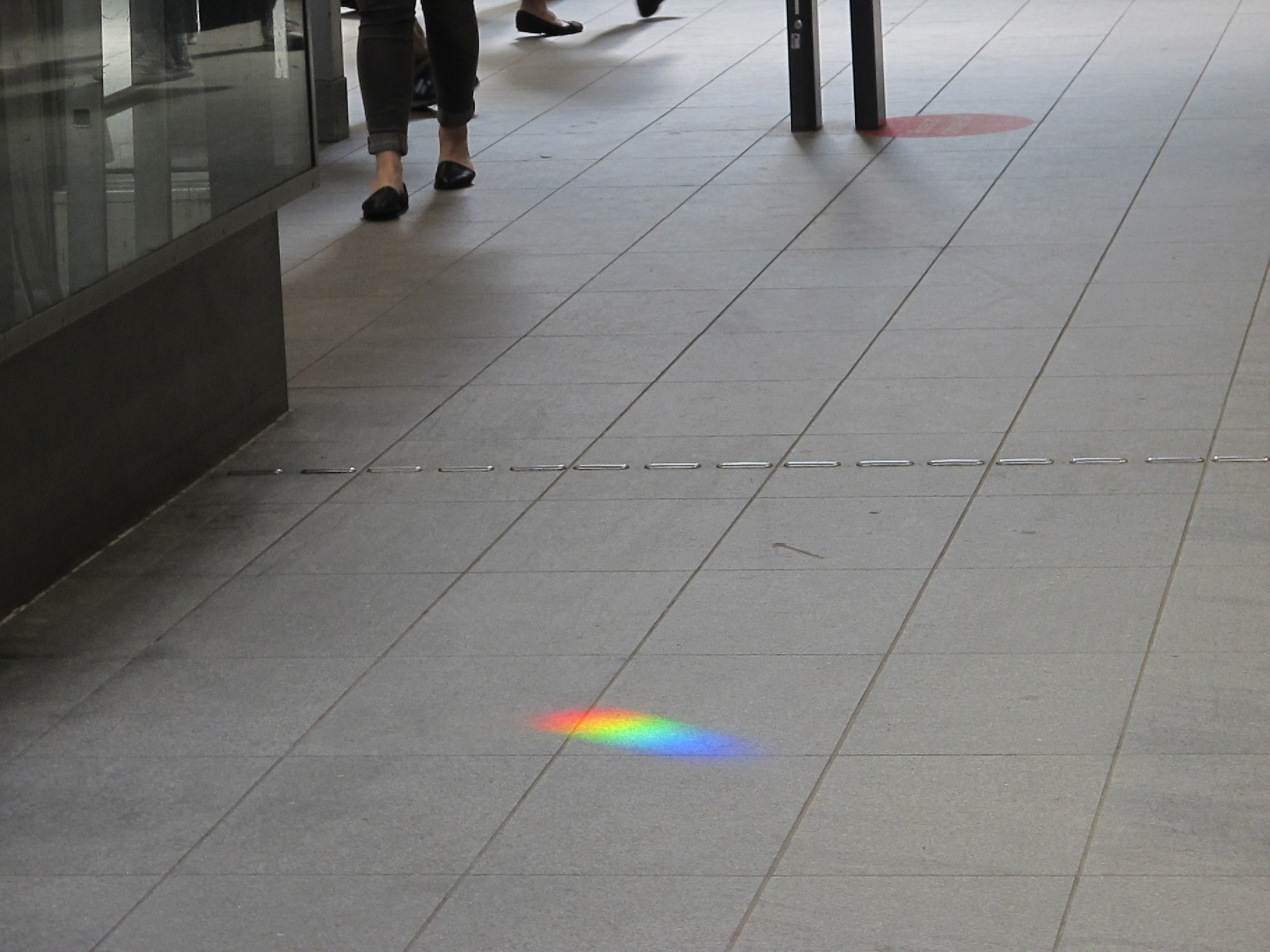 Solplet